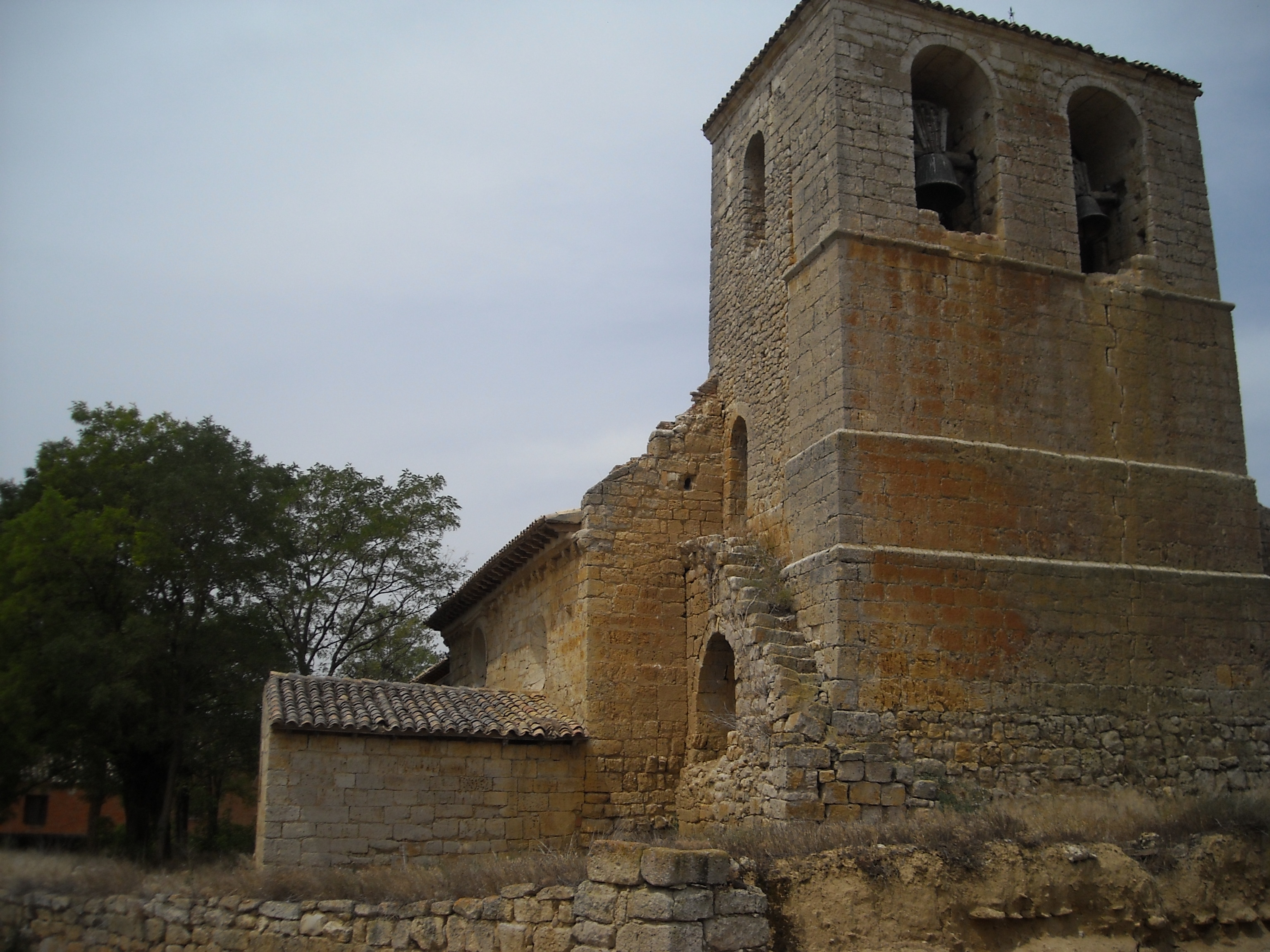 Iglesia de Amayuelas de Abajo